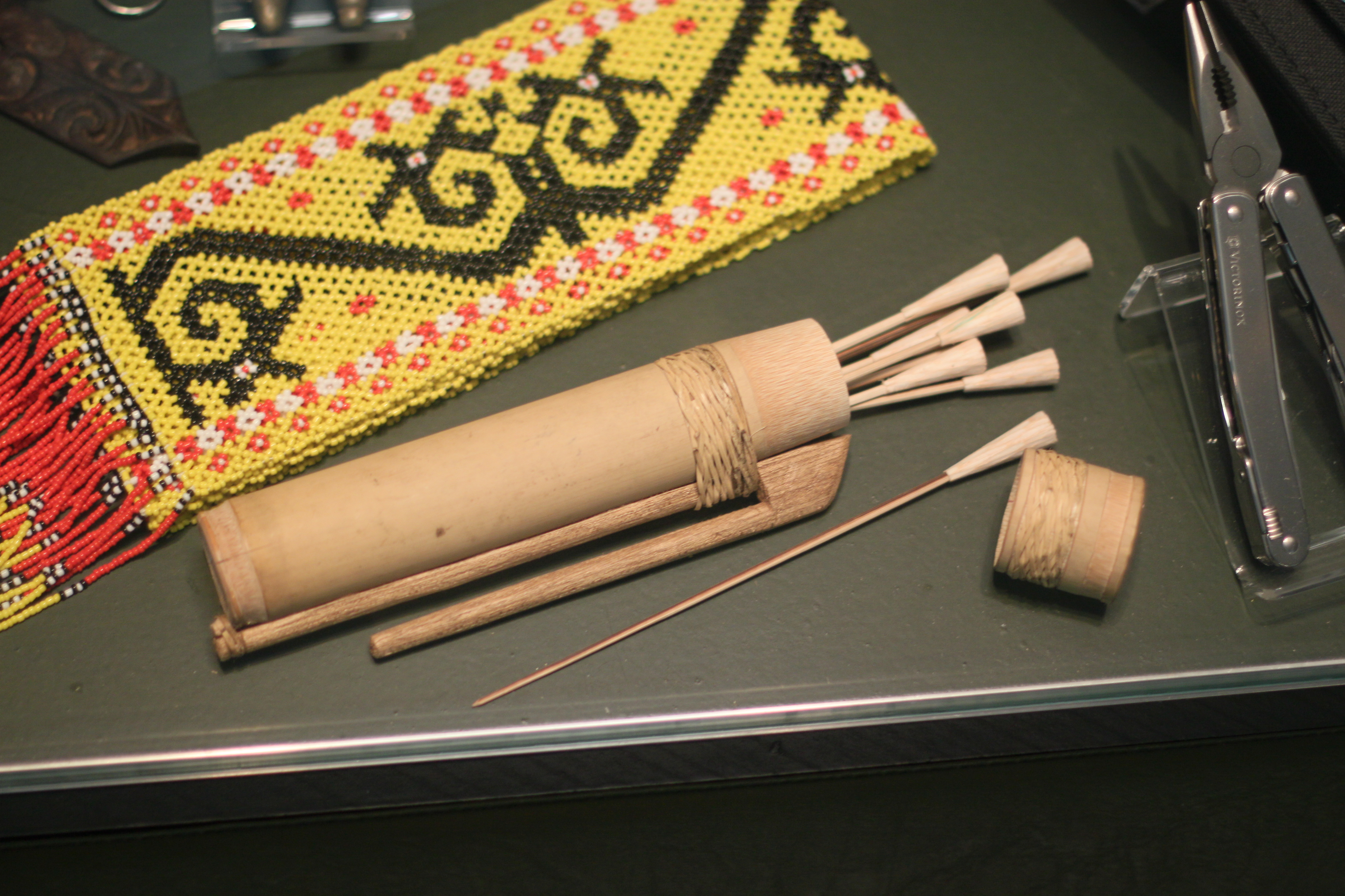 Giftpfeile für Blasrohr und Pfeilköcher